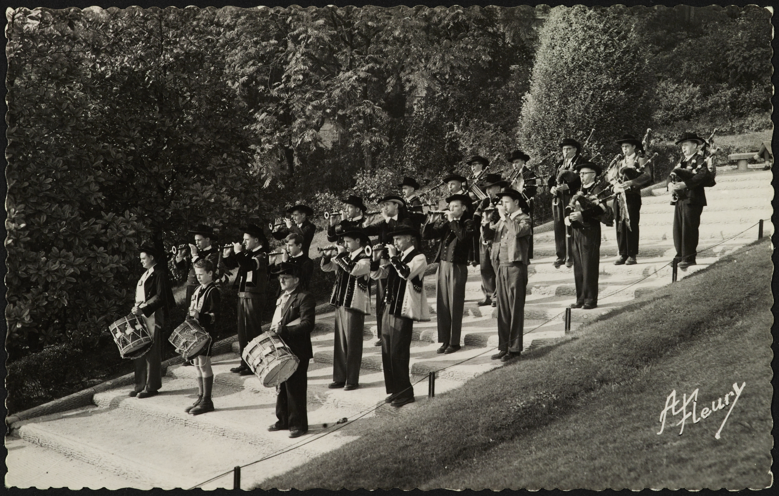 Kenvreuriezh ar Viniaouerien, ancêtre des bagad